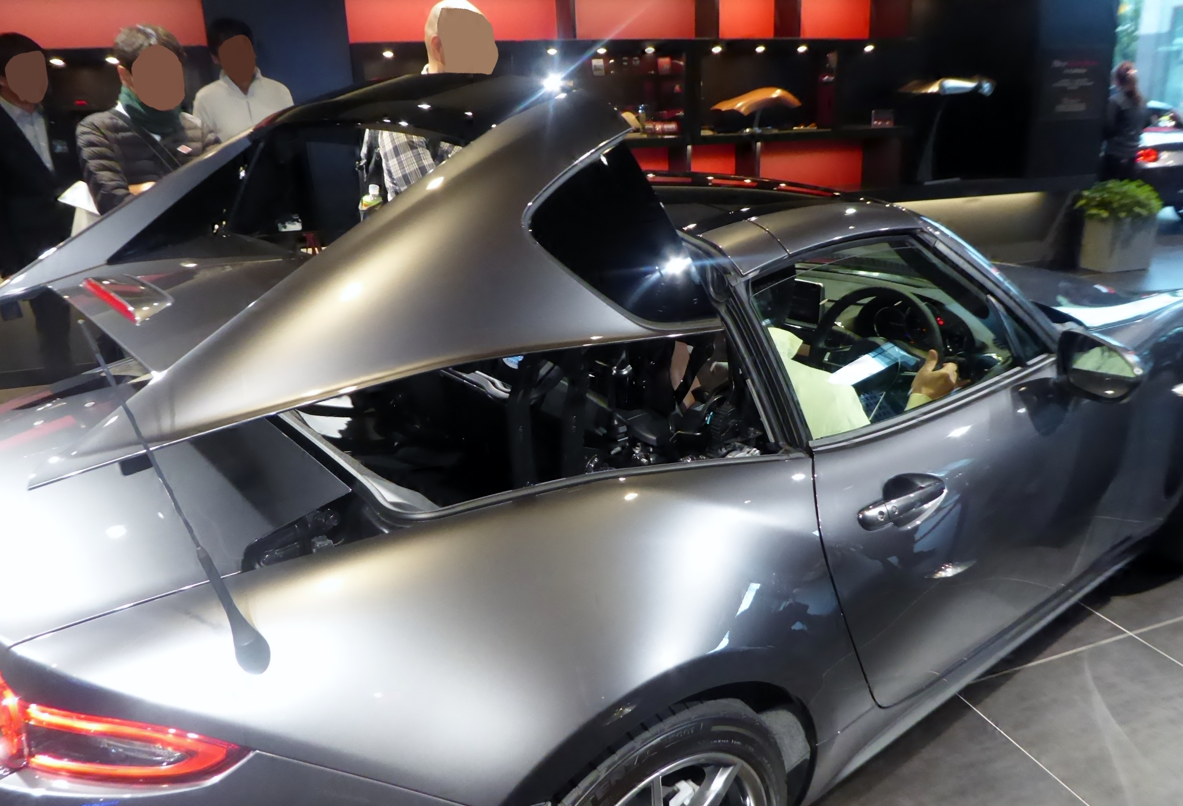 DBA-NDERC型マツダ・ロードスターRF RSのルーフを閉じる様子を撮影。